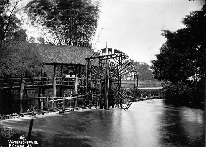 Foto. Een waterrad bij Pajakoemboeh